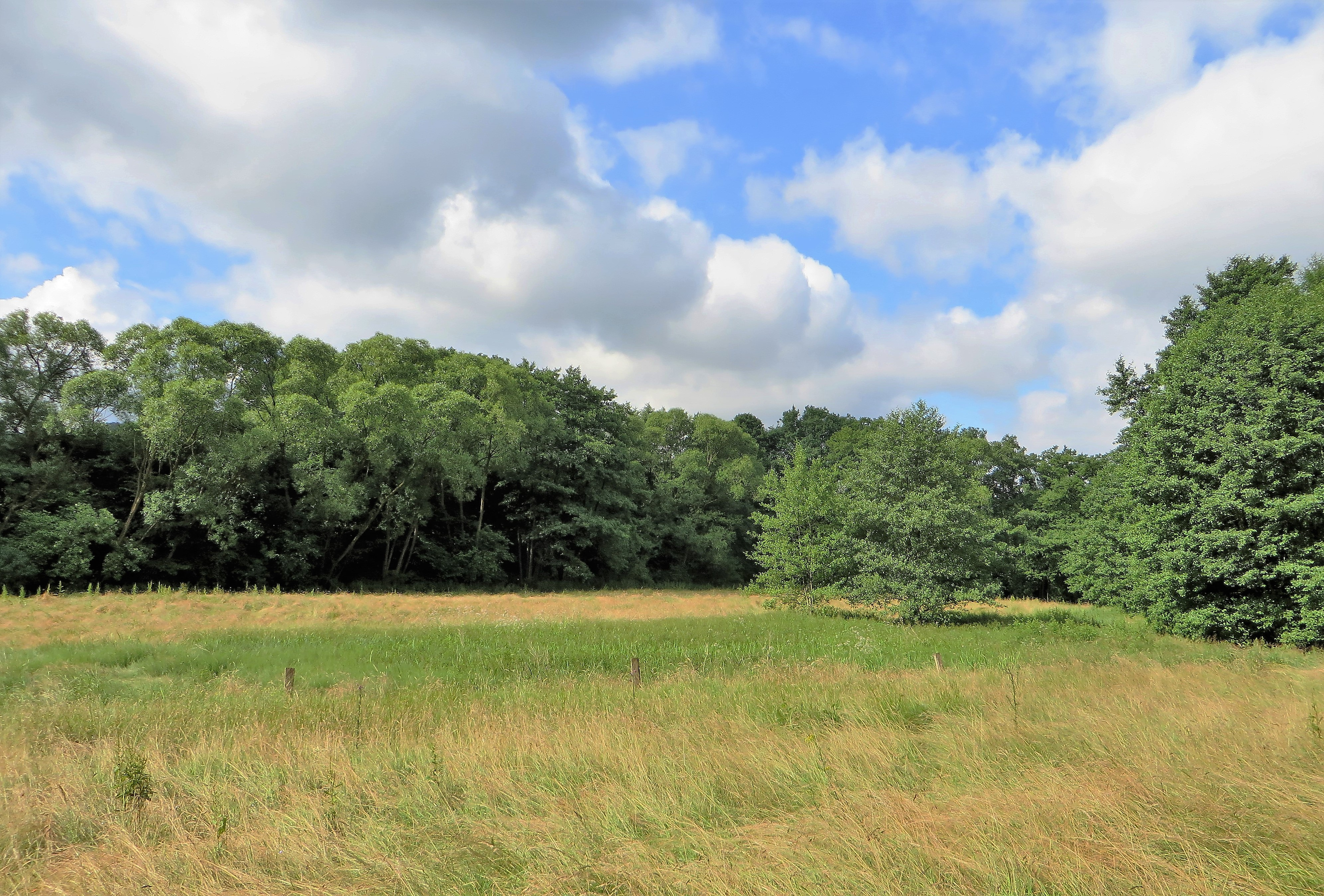 Naturschutzgebiet HA-014 „Oberes Wannebachtal“ im Hagener Stadtteil Berchum; nordöstlich der Tiefendorfer Straße, zwischen Tiefendorf und Stüppenberg. Der Wannebach fließt hinter der Wiese (Foto) unter den Bäumen südwestlich Richtung „Unteres Wannebachtal“ und Lenne. Das Schutzgebiet umfaßt den Talraum des Wannebaches mit dem von Erlen und Weiden begleiteten Bachverlauf, Feuchtwiesen und Feuchtweiden sowie umgebende Laubwaldbereiche. Bachaufwärts schließen sich zahlreiche Zuflüsse und Quellfluren an.